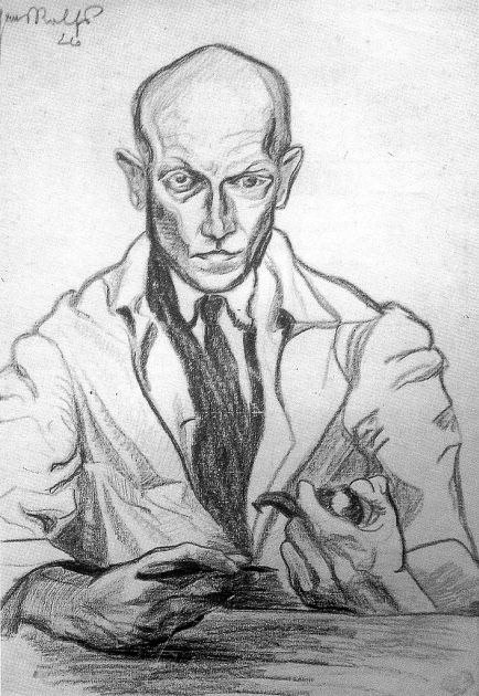 Hans Ralfs Selbstportrait 1926